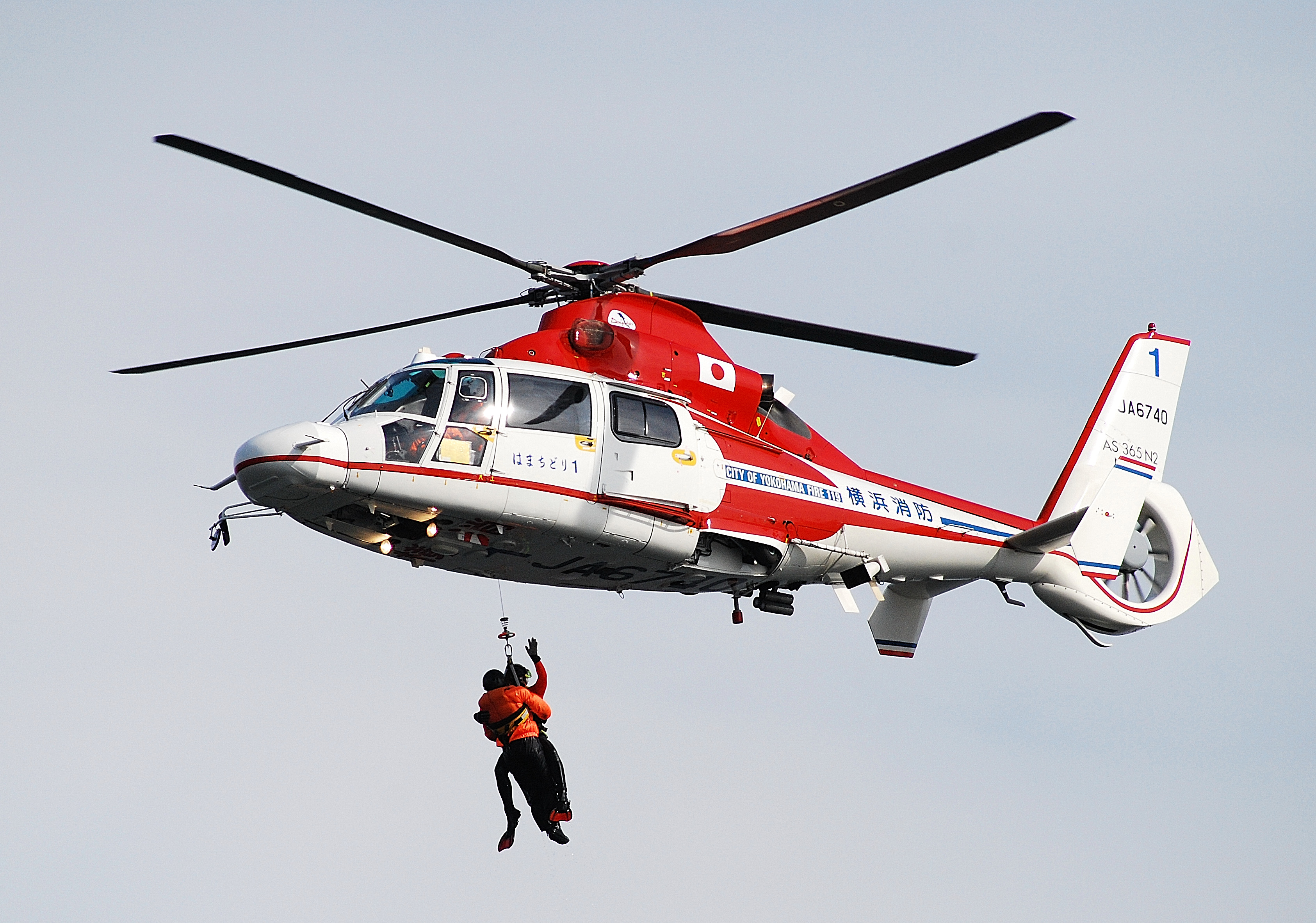 横浜消防出初式で航空救助訓練を行う、横浜市消防局所属のAS365N2型ヘリコプター「はまちどり1」。